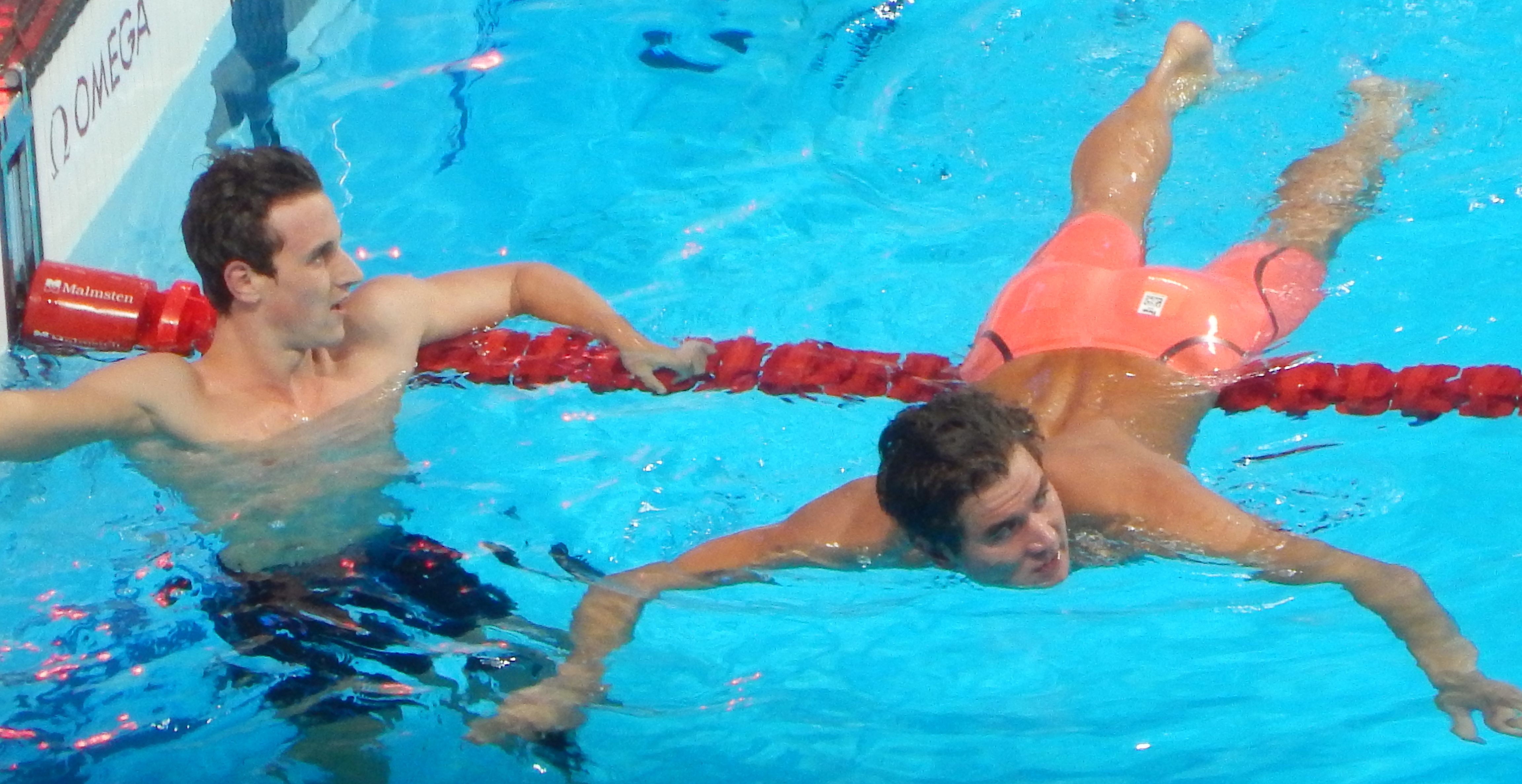 Натан Эдриан и Кэмерон Макивой